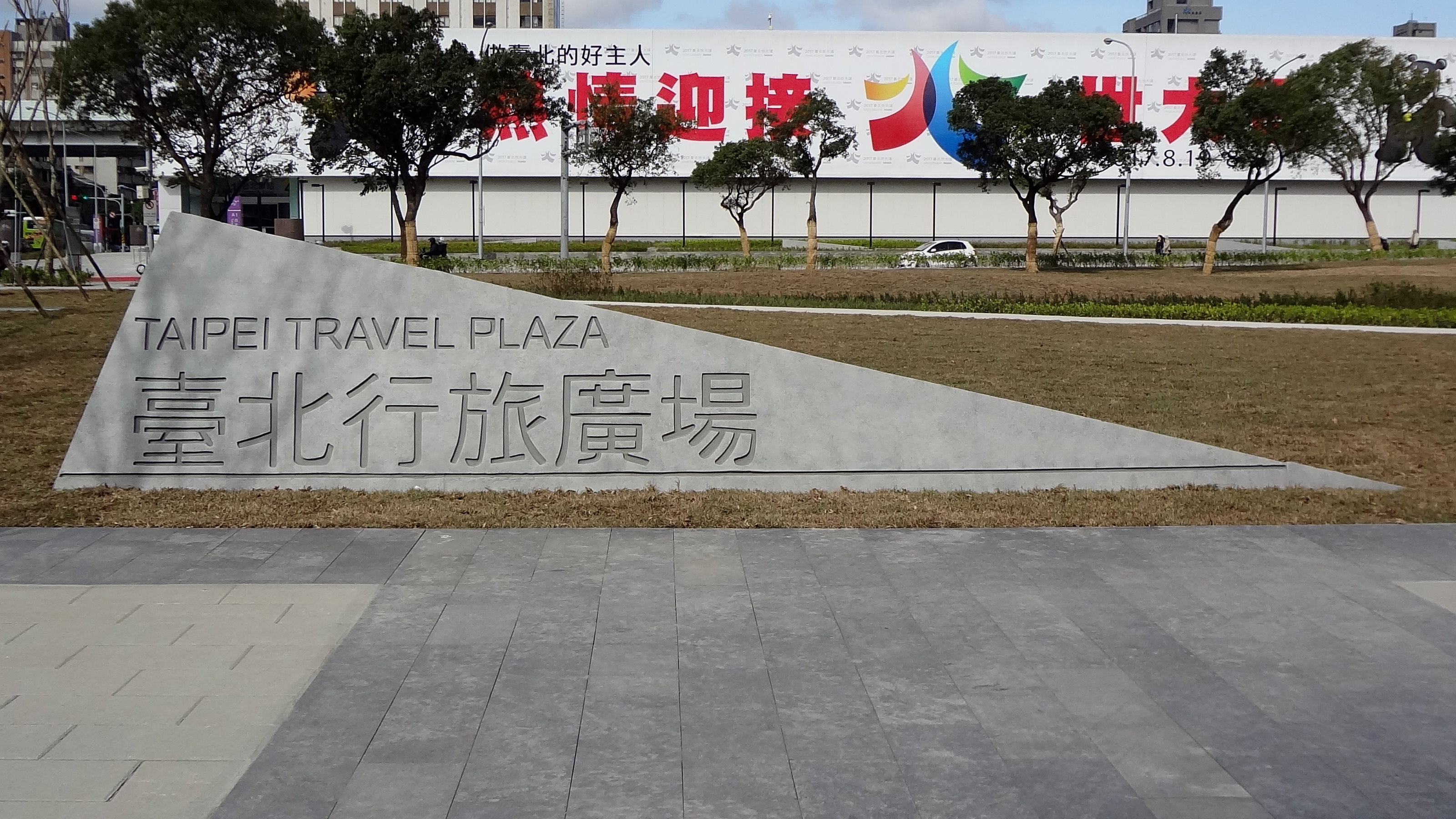 臺北行旅廣場石碑，位於臺北西站B棟原址，正面朝向忠孝西路。